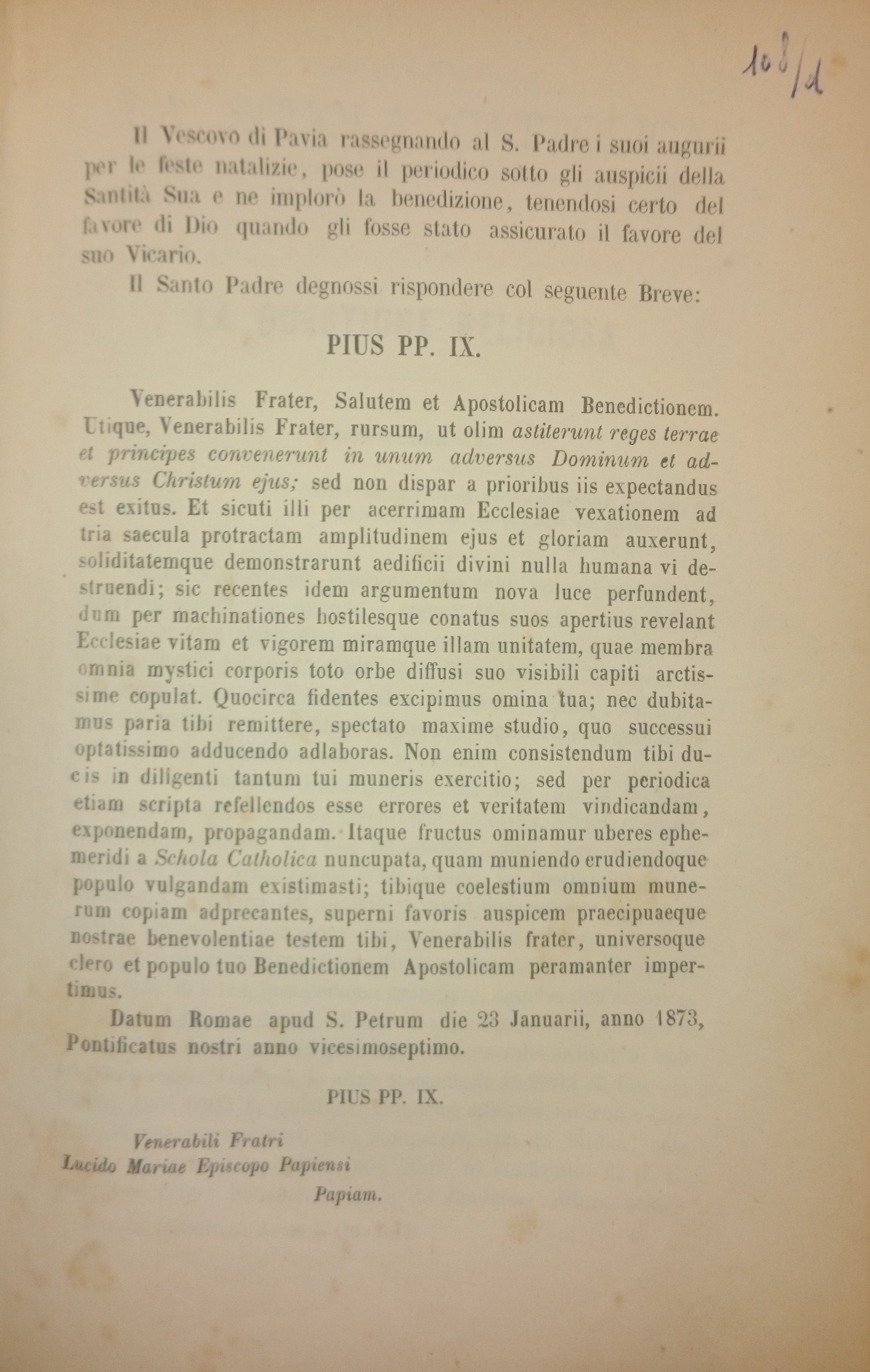 Testo del breve inaugurale che Pio IX inviò al direttore della rivista mons. Lucido Maria Parocchi come augurio.